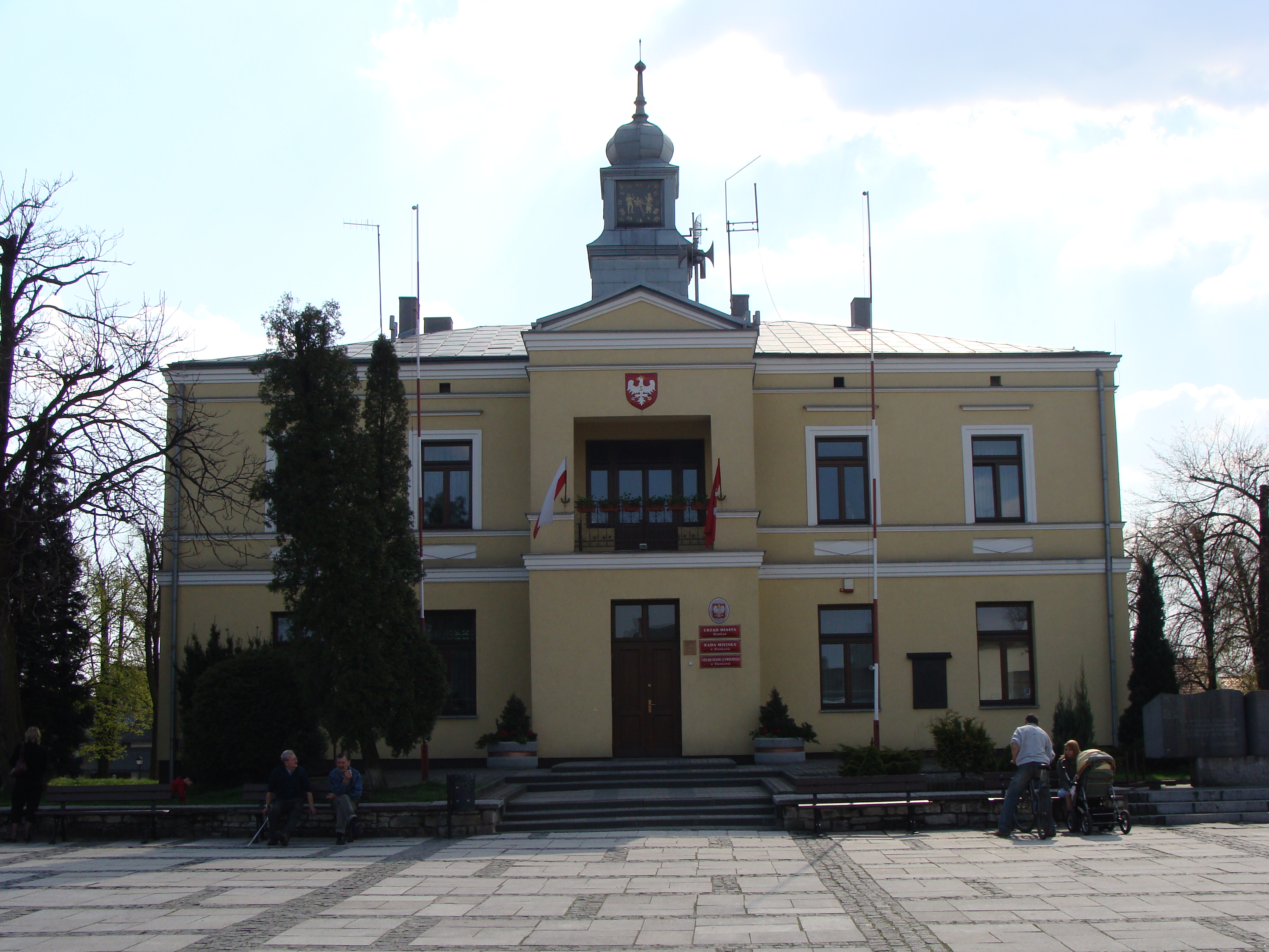 Sławków Rynek - Ratusz